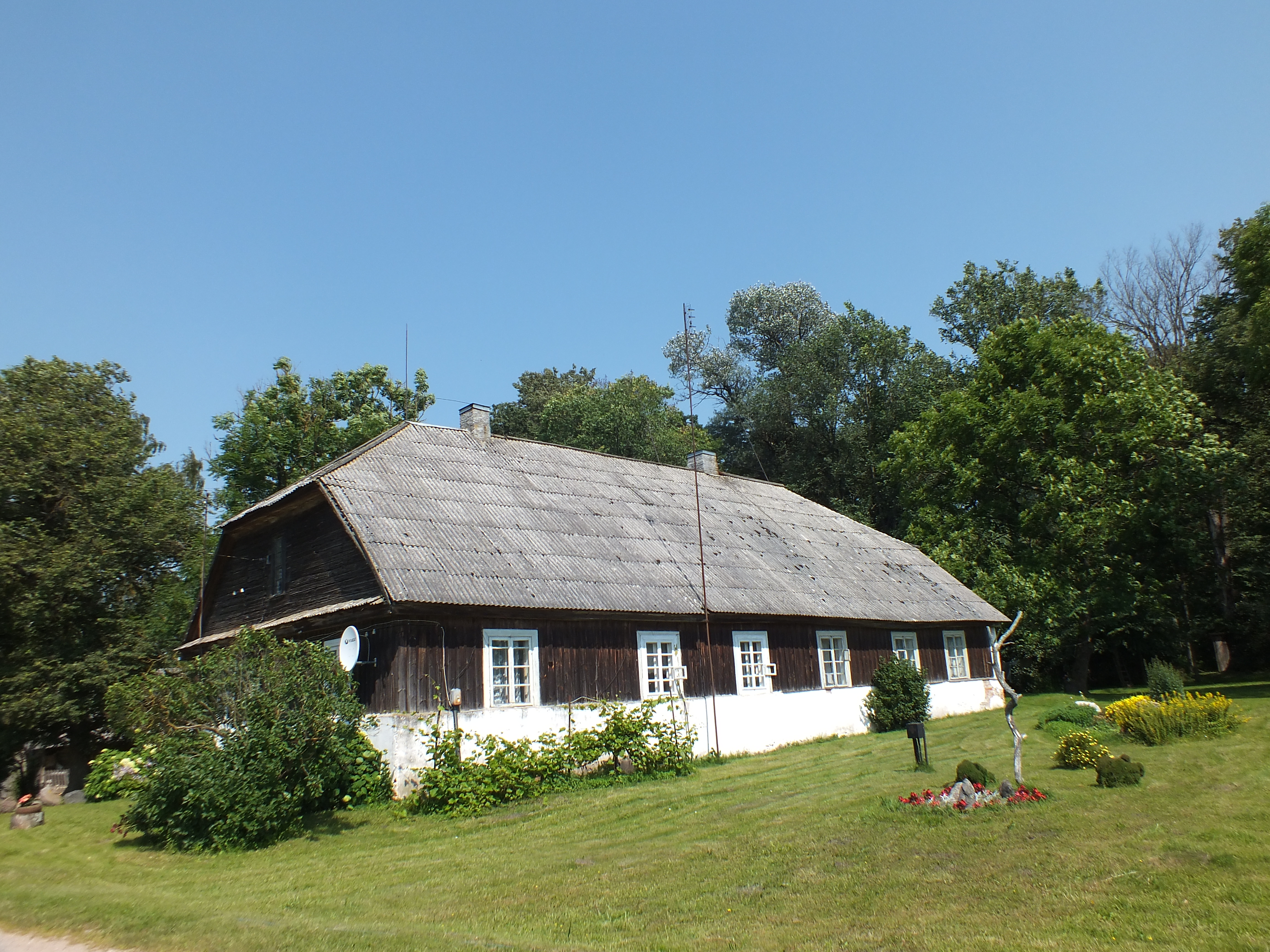 Paširvinčio II-ojo dvaro kumetynas